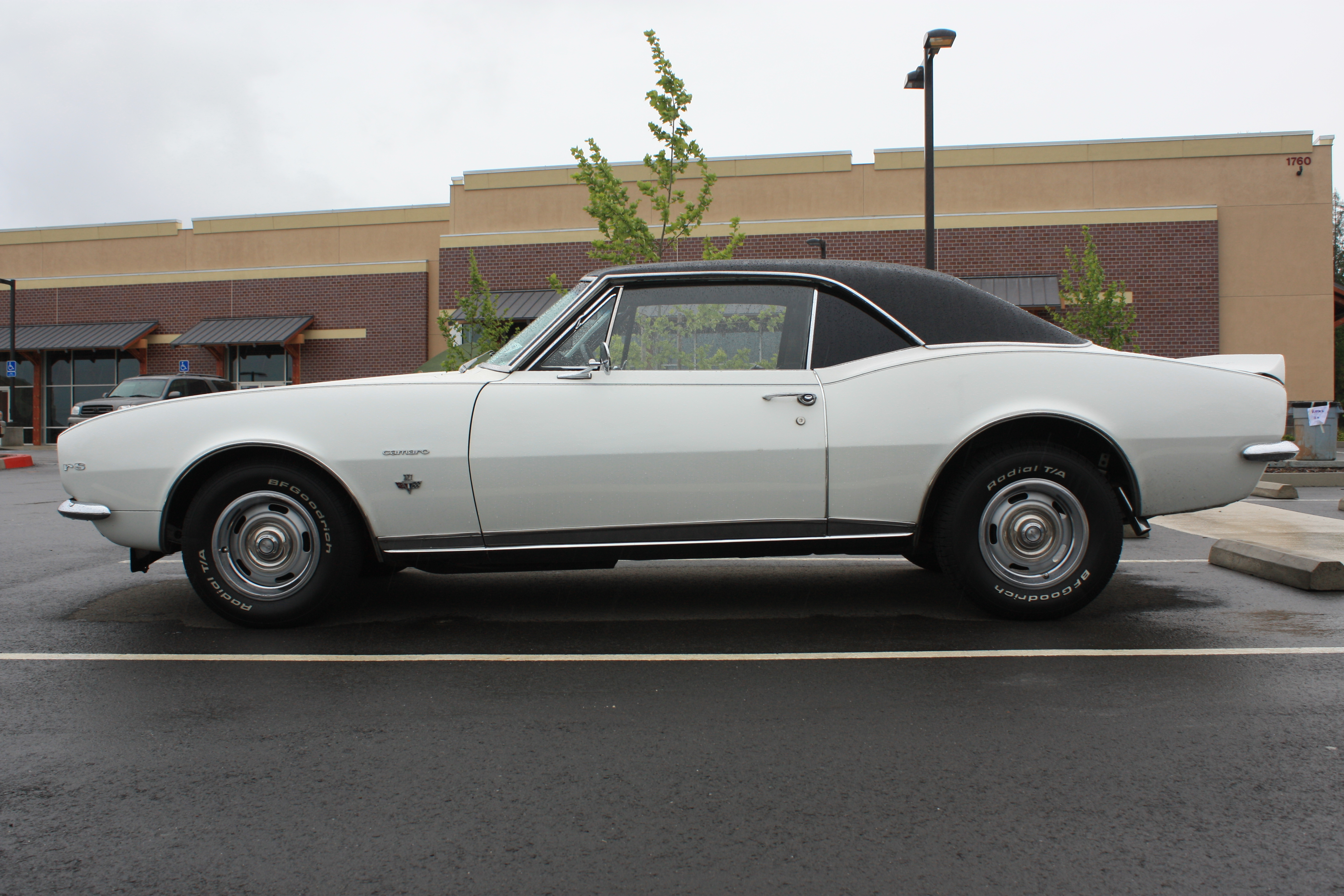 Camaro RS